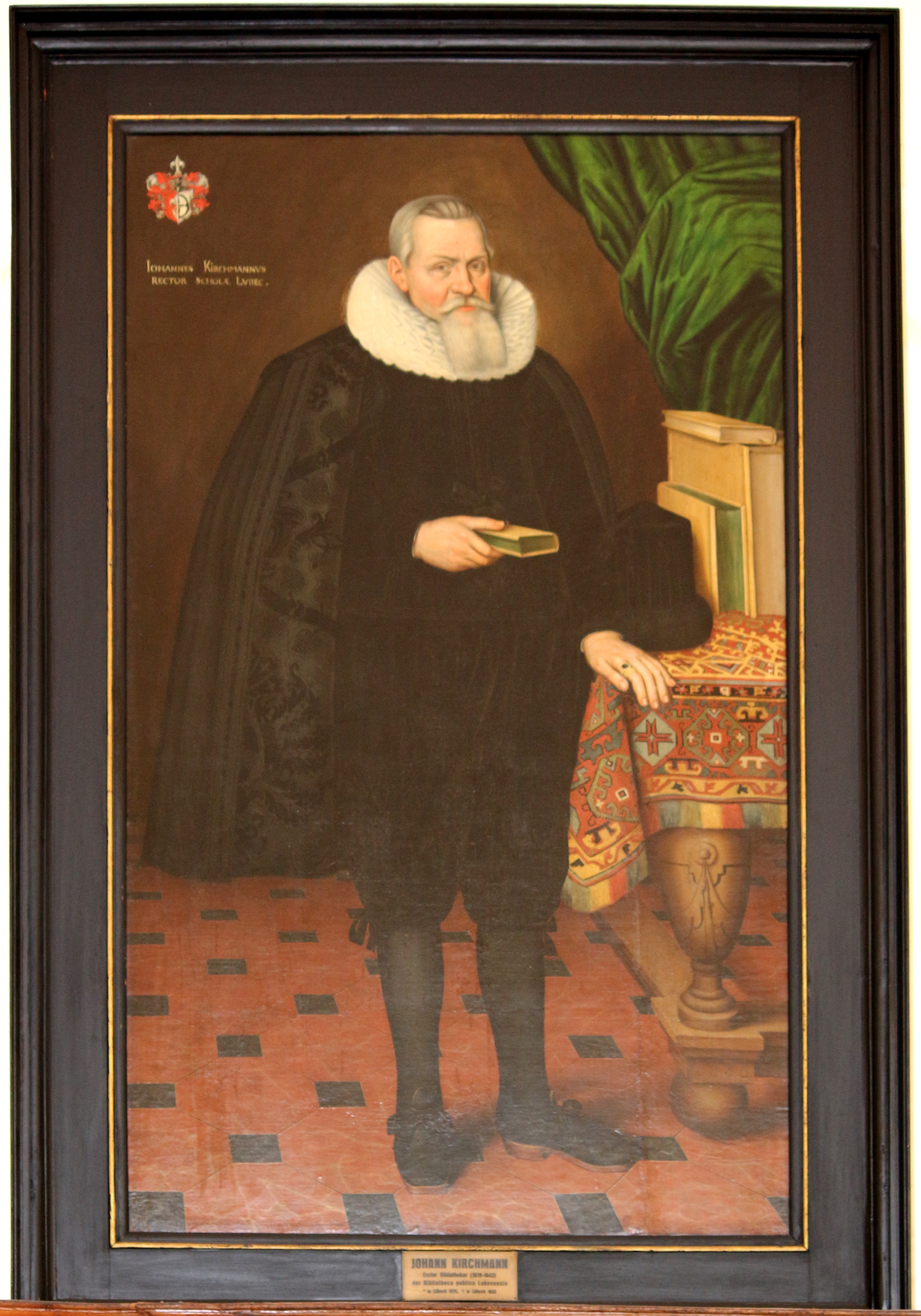 Kirchmann Gemälde in der Stadtbücherei Lübeck